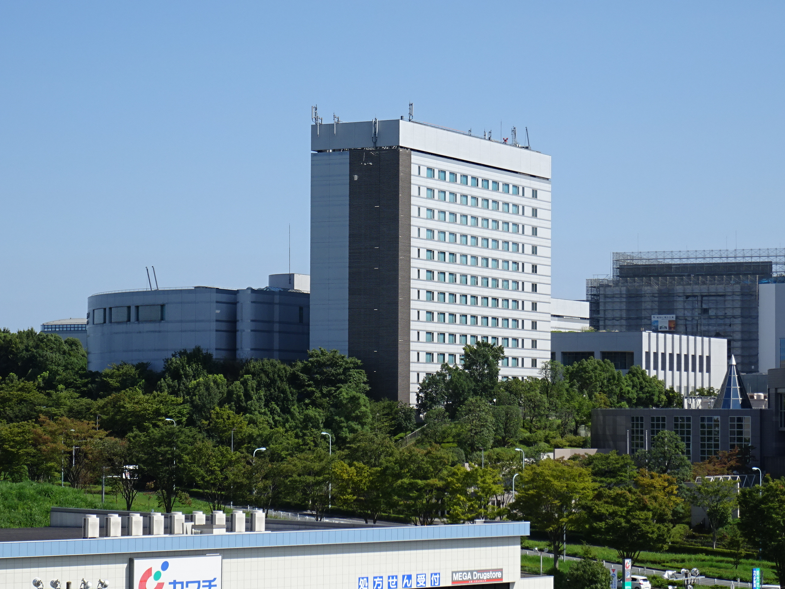 多摩市にある大和証券グループ多摩研修センター（2015/09/20撮影）